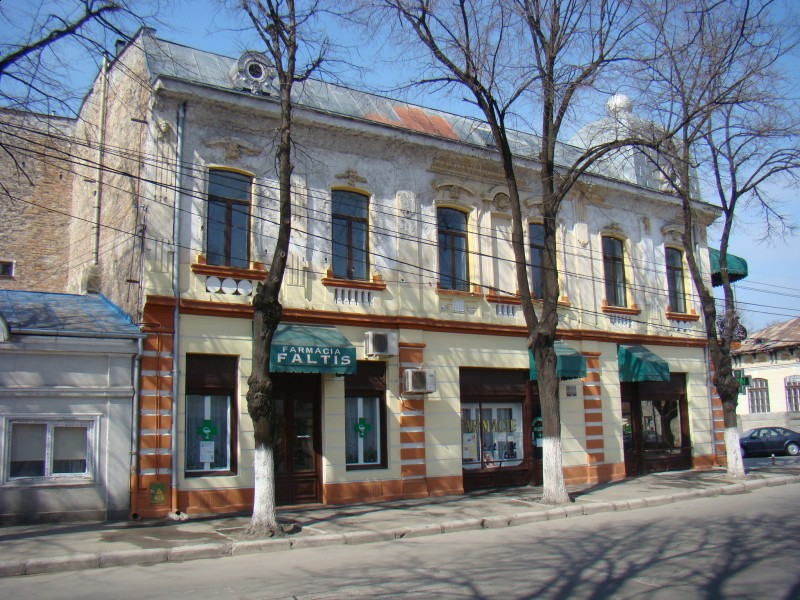 Farmacia Faltis BR (MI)